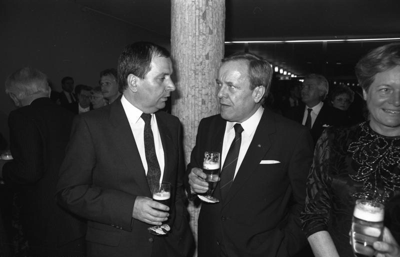 3.6.1987 Der Präsident des Bundesrates, der hessische Ministerpräsident Dr. Walter Wallmann und der Oberbürgermeister der Stadt Bonn, Dr. Hans Daniels, laden ein zu einem Konzert mit anschließendem Empfang in der Bonner Beethovenhalle.